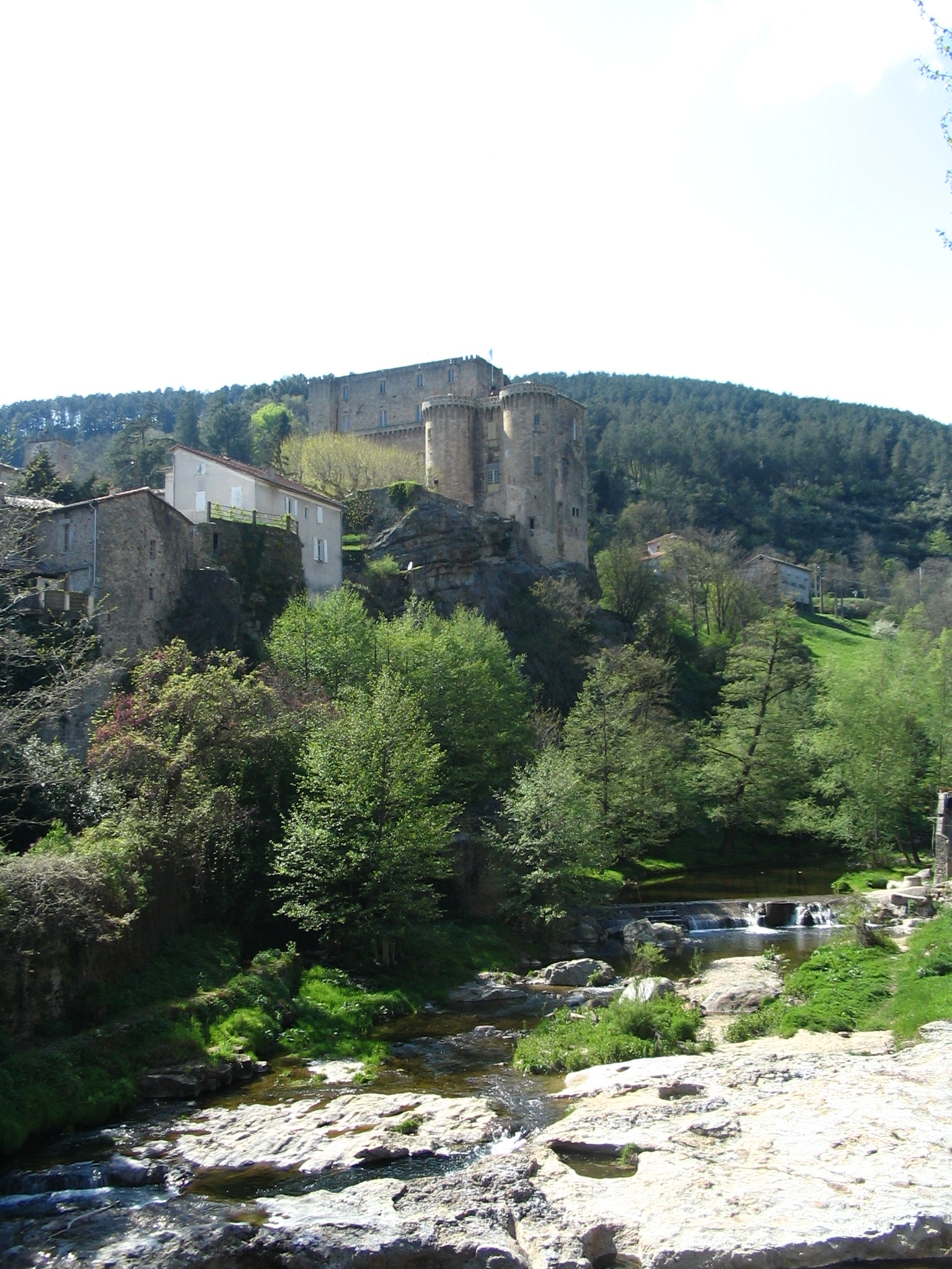 Schloss von Largentière